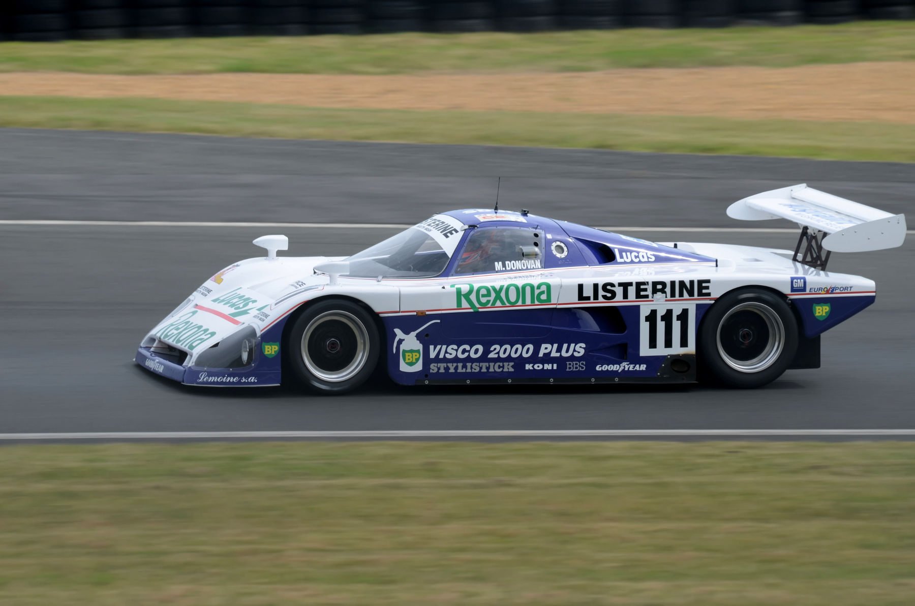 Spice SE88C - Ford de l'écurie Spice Engineering ayant participée aux 24 Heures du Mans 1988 avec comme pilote Ray Bellm, Gordon Spice et Pierre de Thoisy